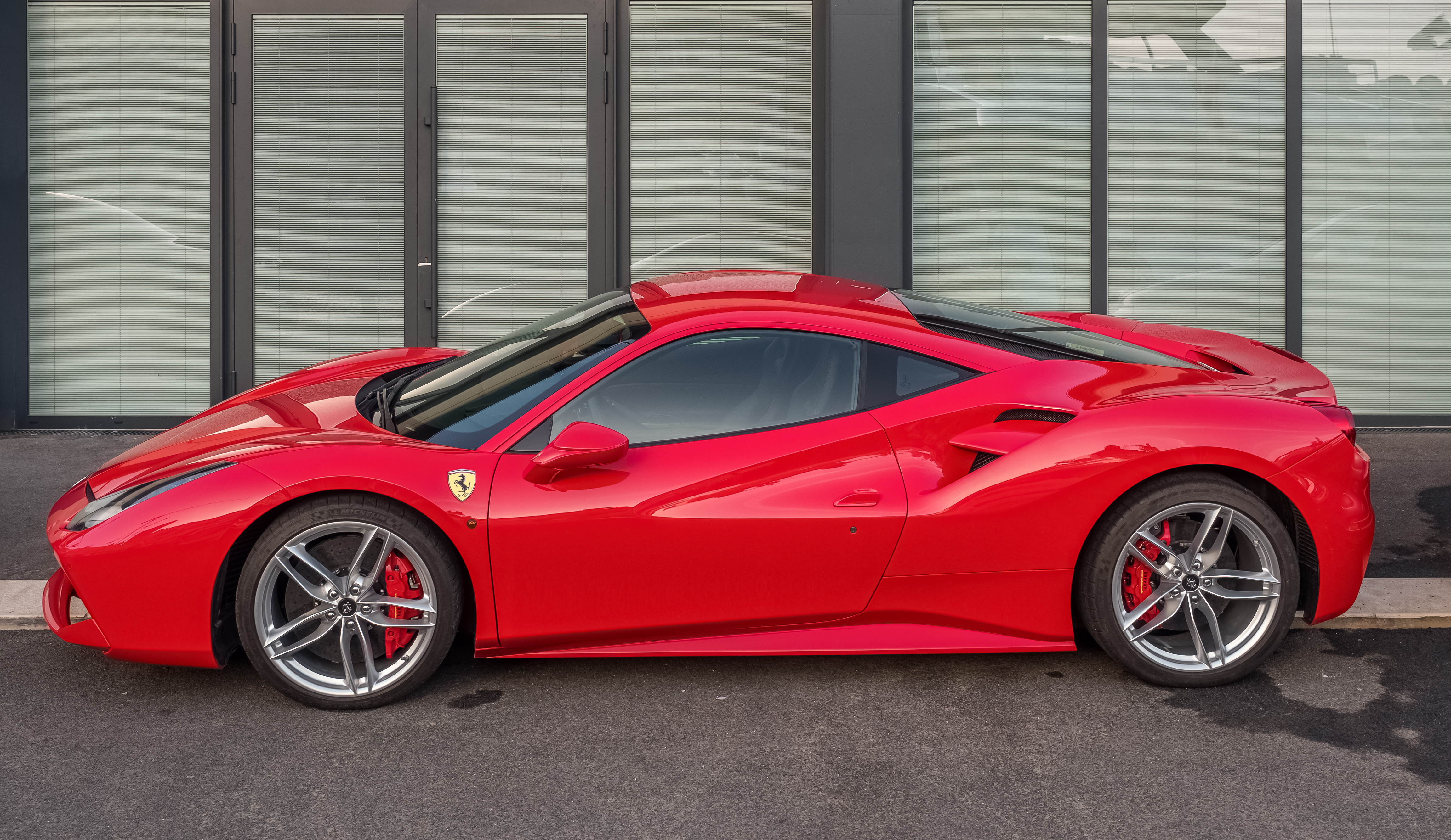 Ferrari 488 GTB